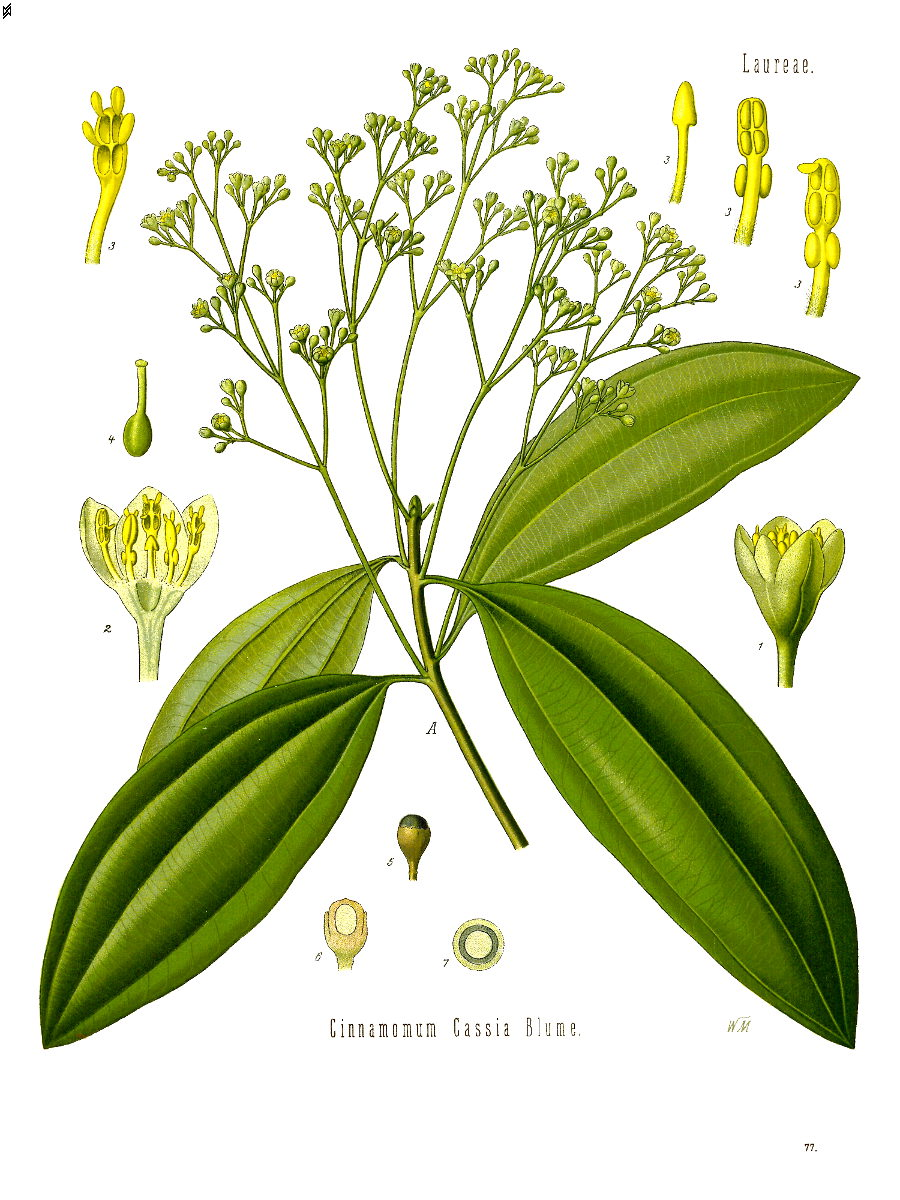 Planche botanique n° I-77 de l'"Atlas des Plantes médicinales de Köhler en images réalistes avec brèves notes explicatives" consacrée à la casse.